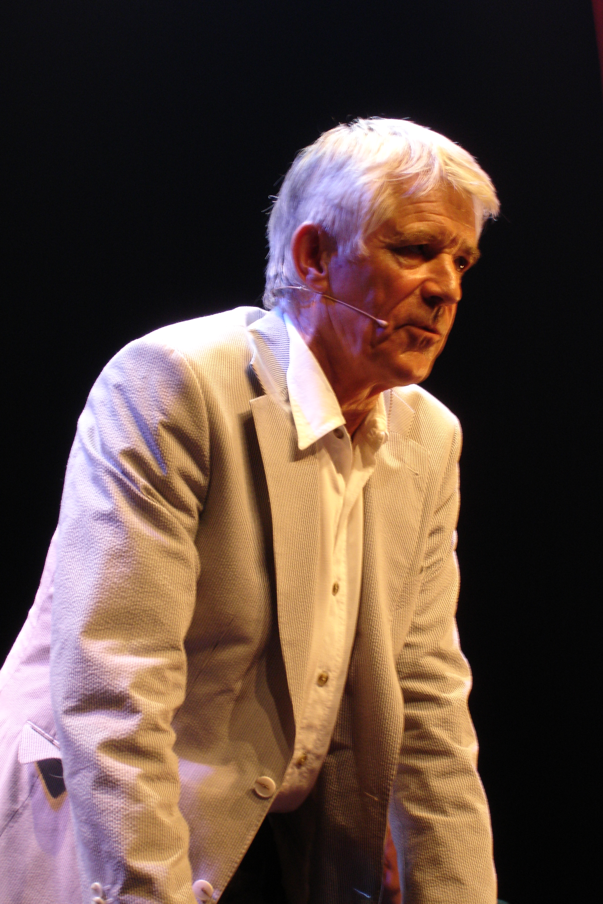 Kees van Kooten